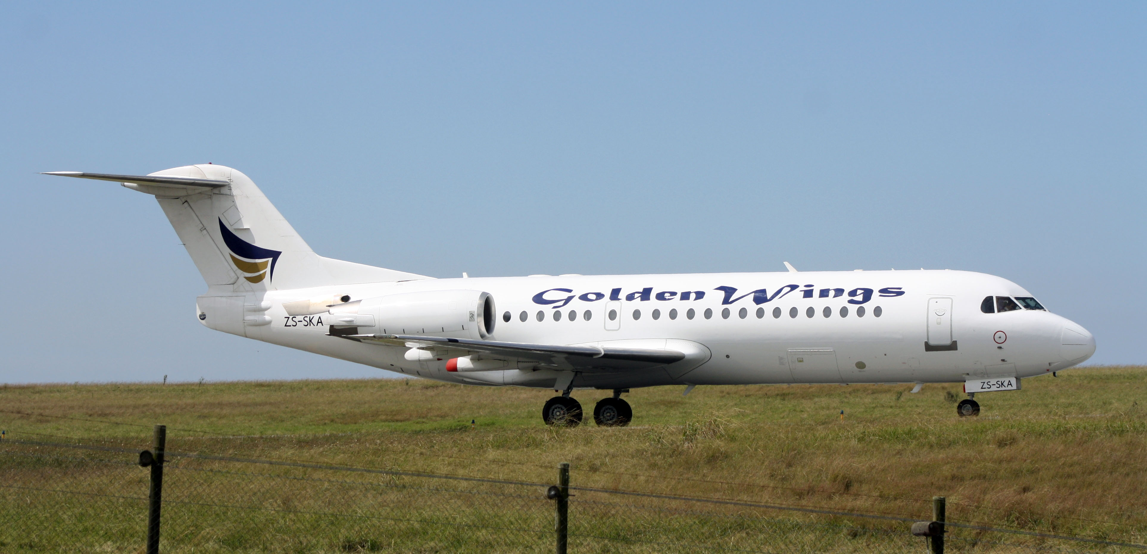 Golden Wings Fokker F70 ZS-SKA